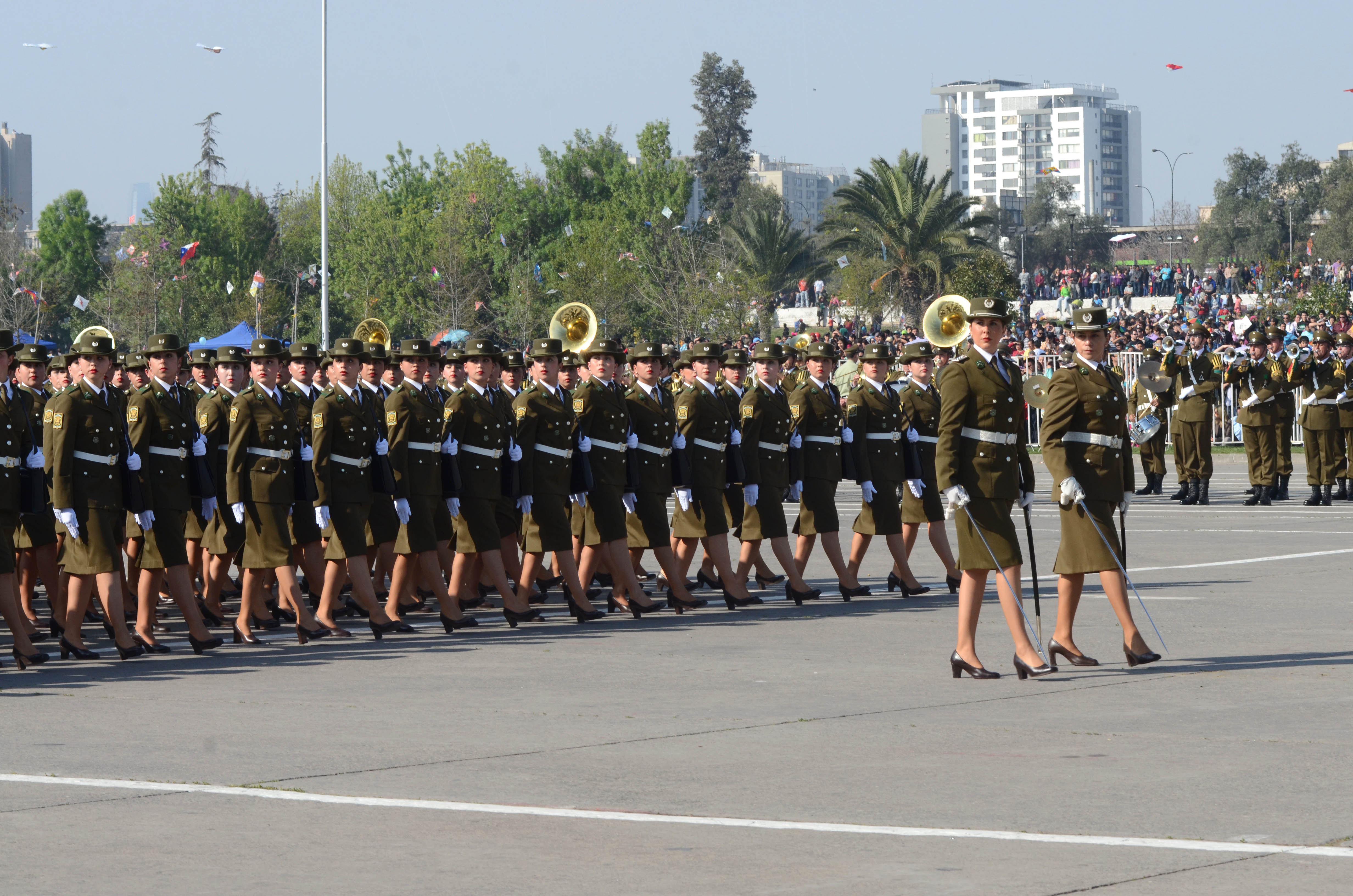 Parada Militar 2014